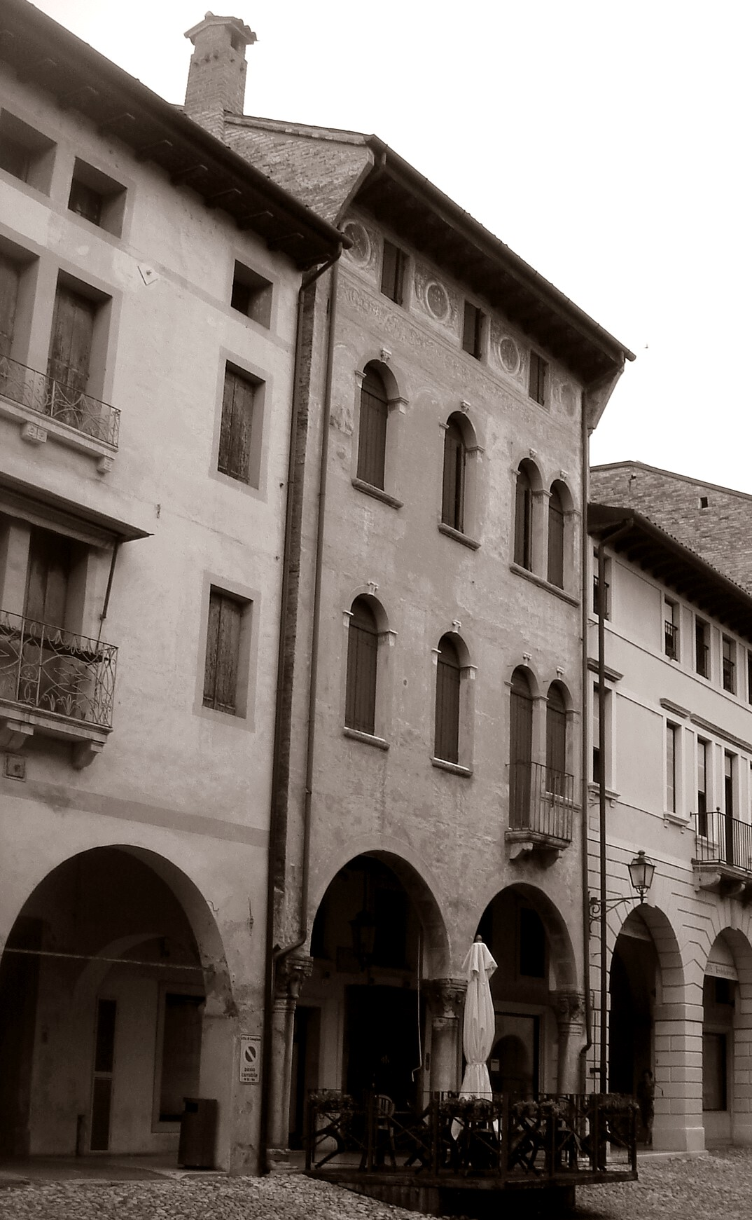 Conegliano (Treviso): Casa Biffis (XV secolo), sul lato nord di via XX settembre.